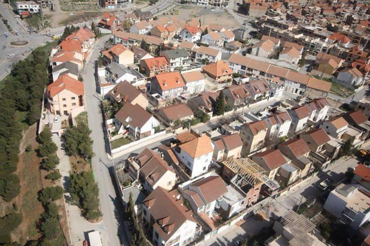 Au dessus de la cité Dallas sétif